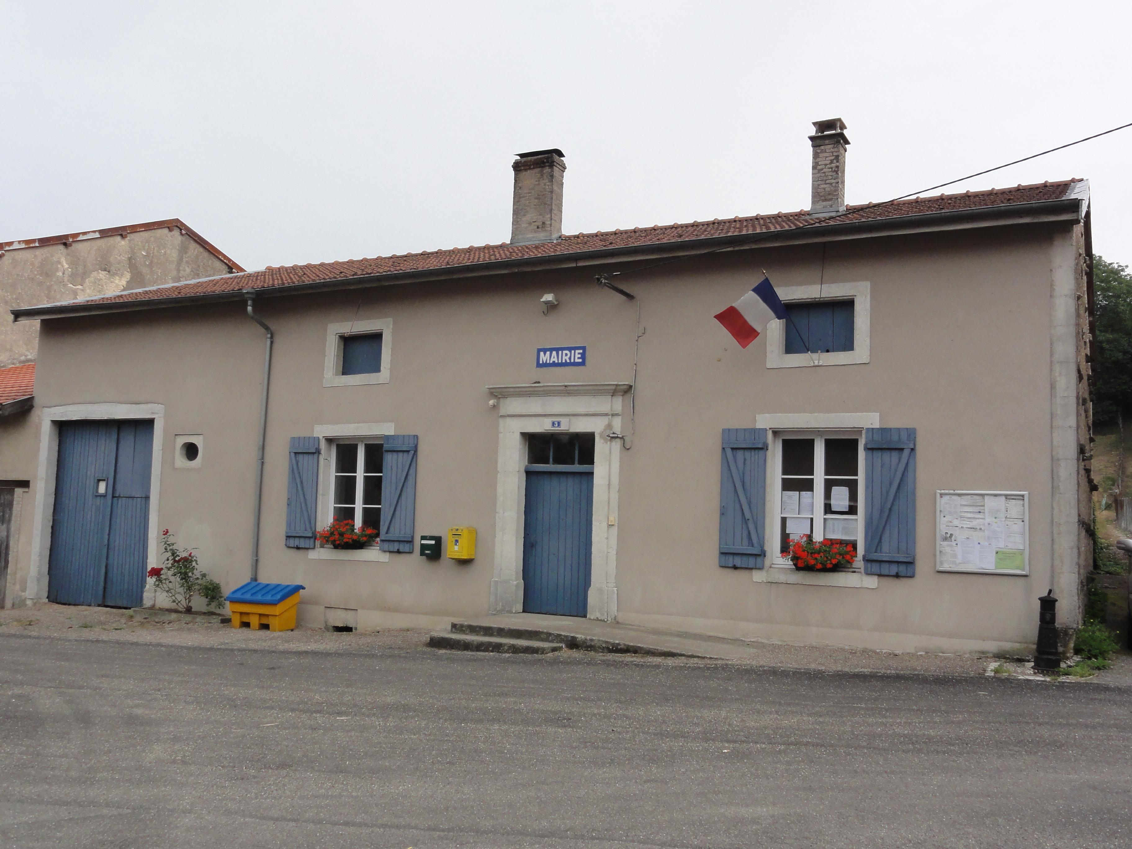 Rampont (Les Souhesmes-Rampont, Meuse) mairie